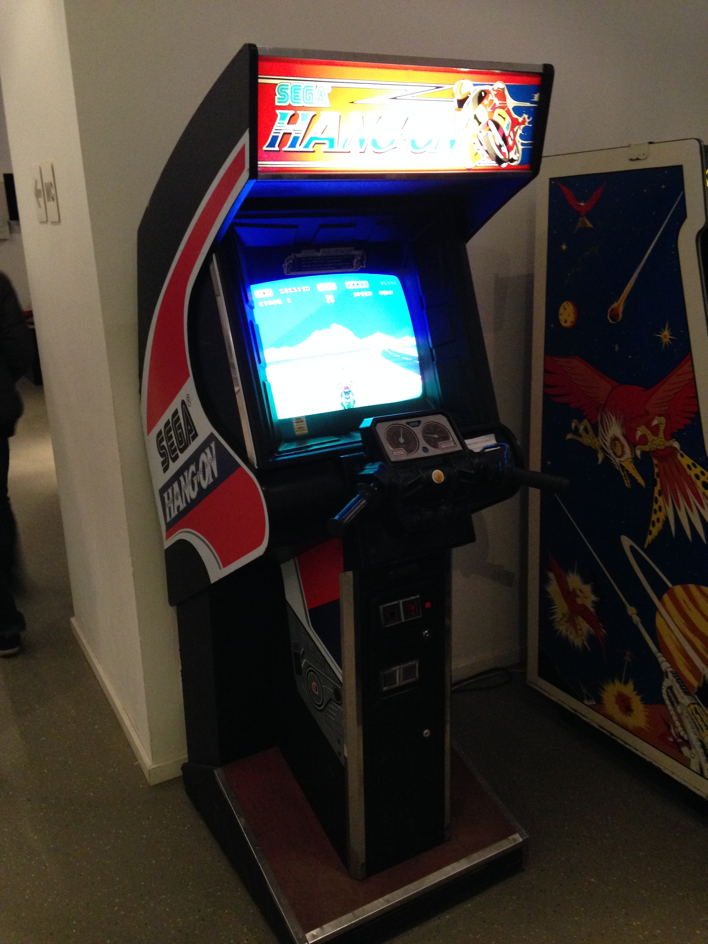 Sega Hang on Arcade Automat